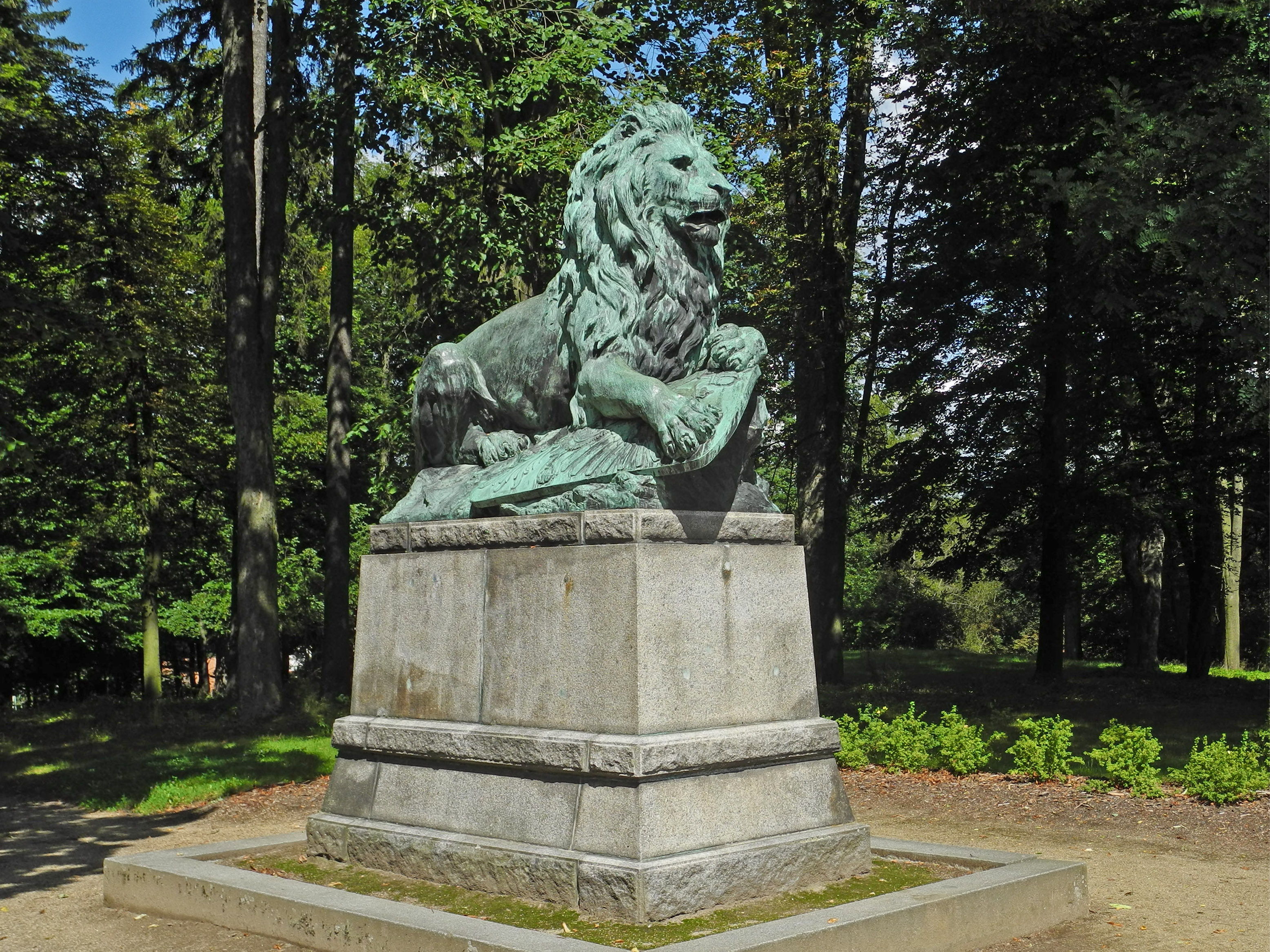 Löwenskulptur in Schönlinde (Krásná Lípa), errichtet im Jahr 1908 anlässlich des 60-jährigen Regierungsjubiläums von Kaiser Franz Josef, geschaffen vom Dresdner Bildhauer Clemens Grundig, gegossen in der Dresdner Gießerei Bierling. Dargestellt ist der böhmische Löwe, als Symbol des Königreichs Böhmen, der den österreichisch-ungarischen Adler, also die k.u.k.-Monarchie, schützt. Es soll an die Gefallenen im Preußisch-Österreichischen Krieg von 1866 erinnern. Die ursprünglich am Sockel angebrachte Tafel mit den Namen der Opfer ist nicht mehr vorhanden.